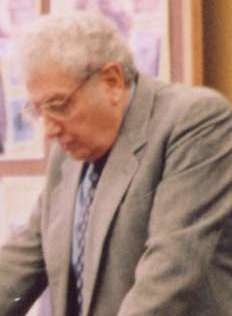 Prof. Cherif Bassiouni in qualità di esperto dell'ONU per i diritti umani in Afghanistan